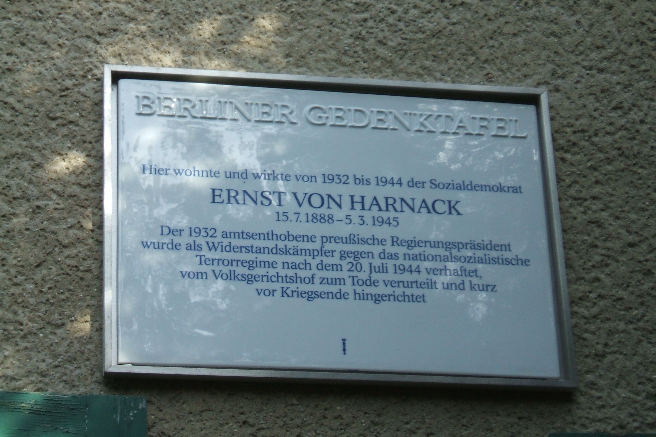 Berliner Gedenktafel. Zum Gedenken an Ernst von Harnack, Berlin-Zehlendorf, Am Fischtal 8